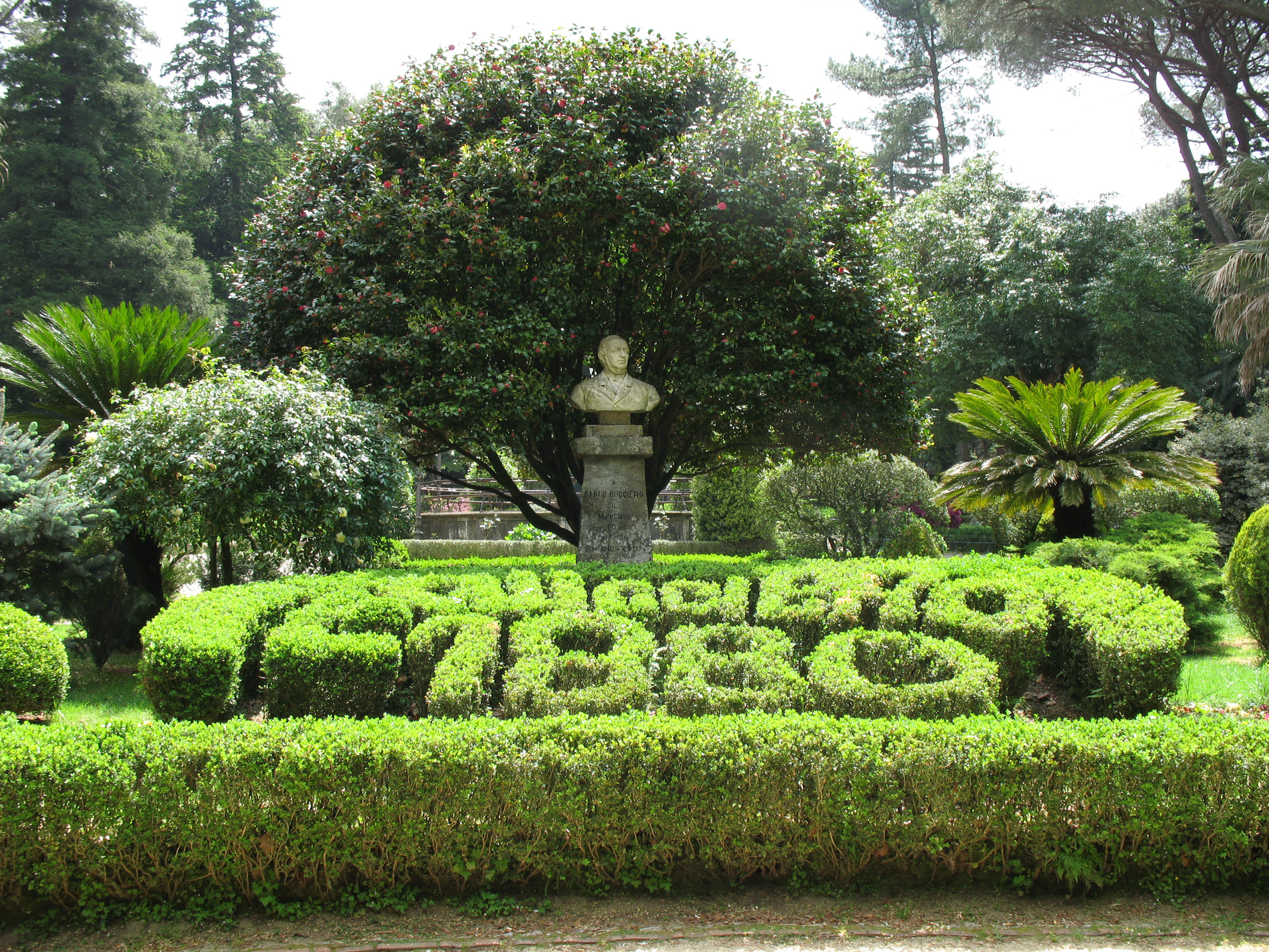 Foto della villa comunale di Cittanova (RC), Italy